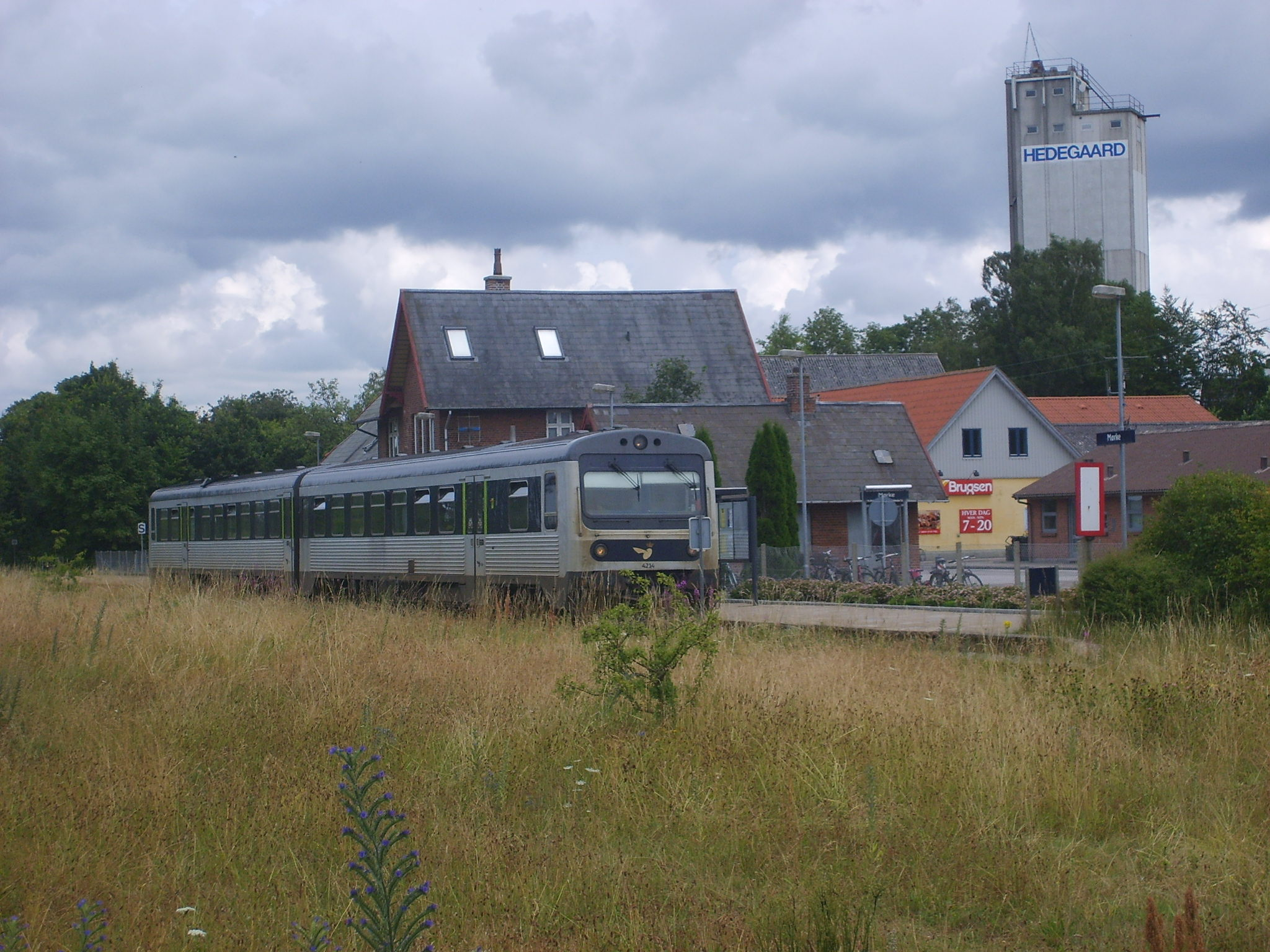 Train station in Mørke, Denmark.